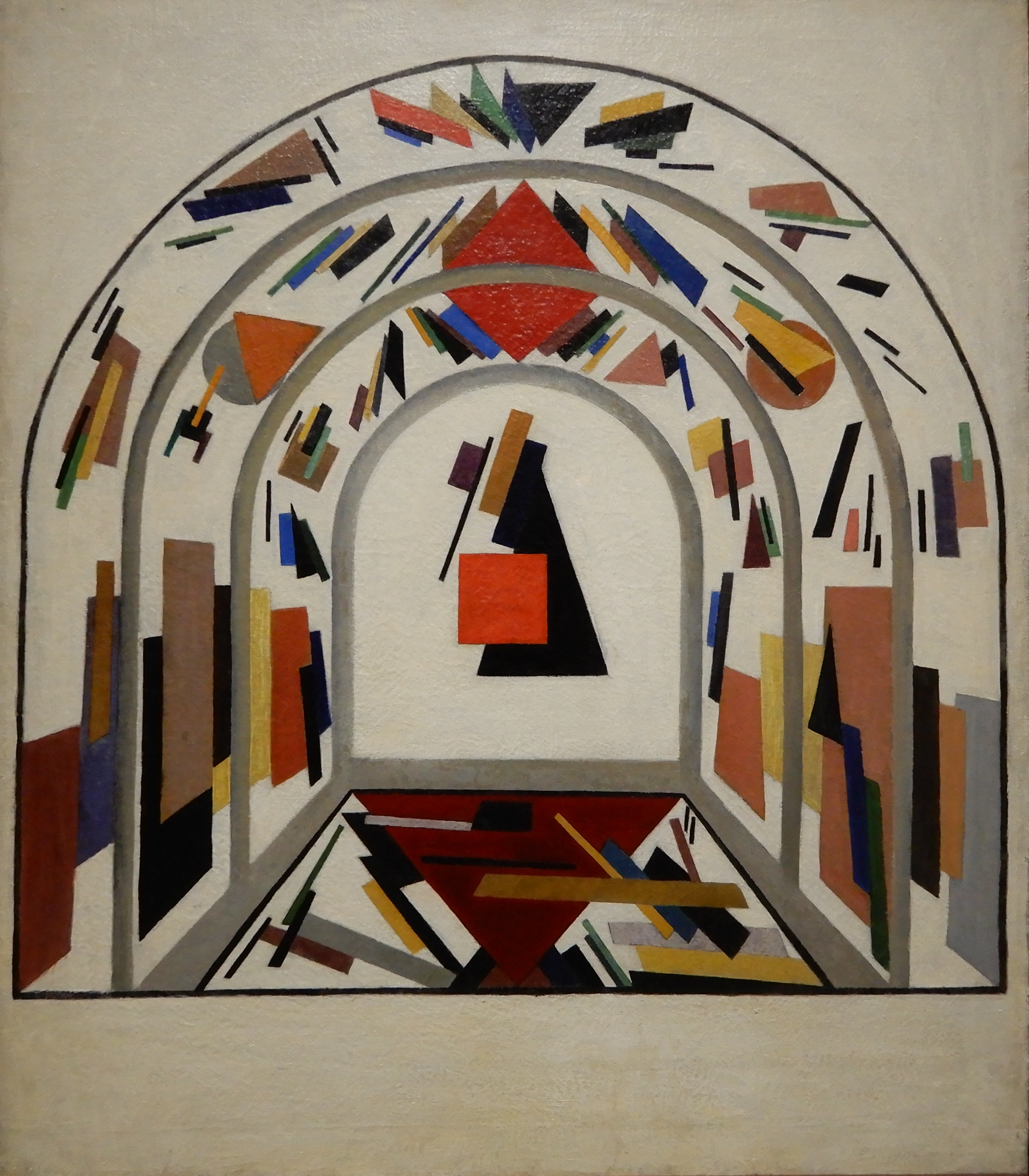 Projet de décoration d'une salle du premier théâtre soviétique d'Orenbourg, par le peintre Ivan Koudriachov.